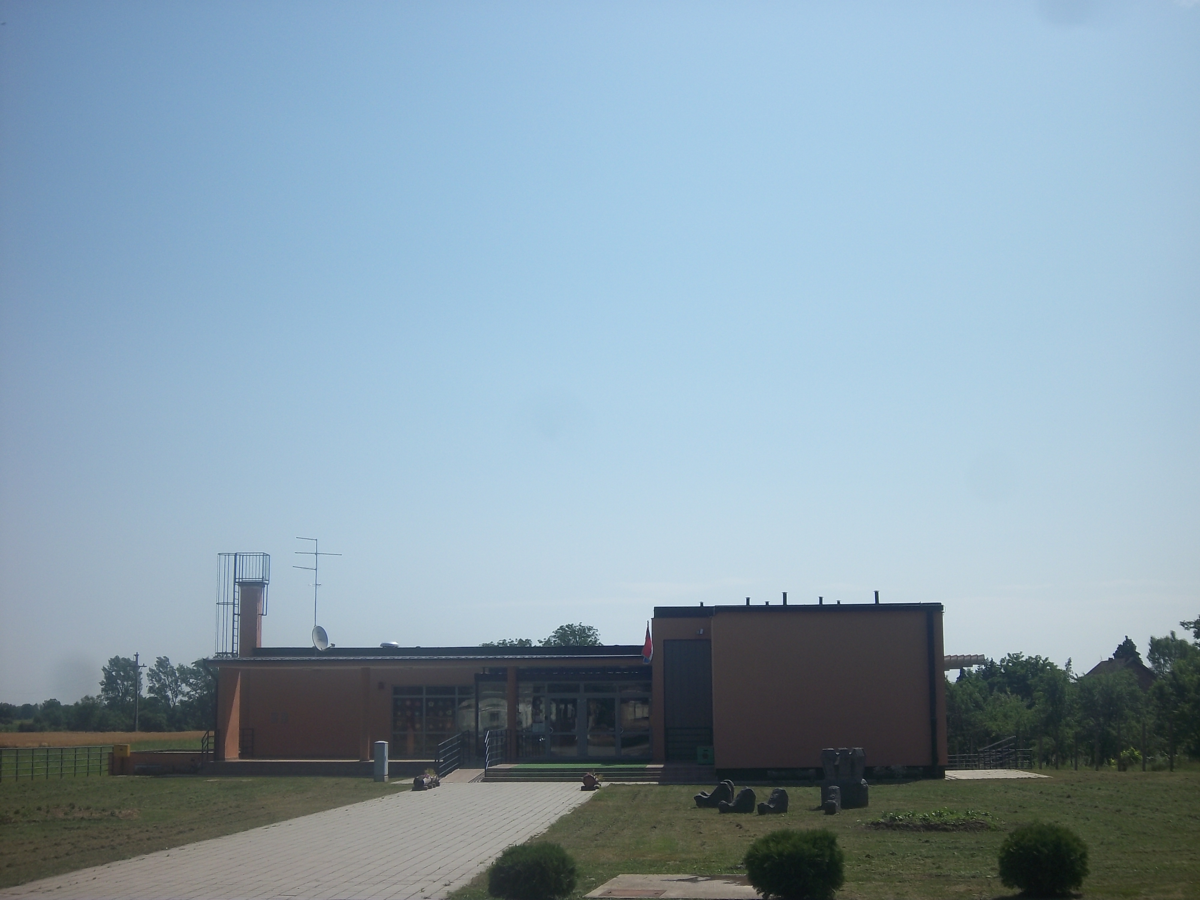 Srpskohrvatski / српскохрватски: Osnovna škola u naselju Čakovci u Općini Tompojevci u Vukovarsko-srijemskoj županiji (Republika Hrvatska).